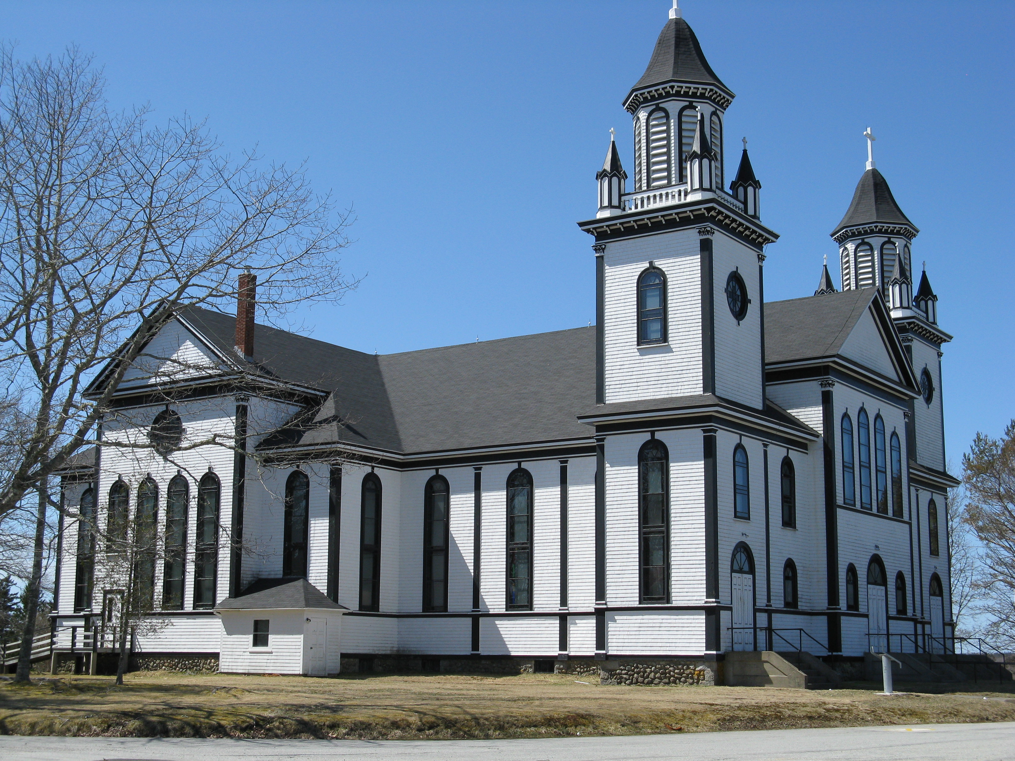 Église Sainte-Anne du Ruisseau à Sainte-Anne-du-Ruisseau, bien inscrit au registre provincial en 1992.